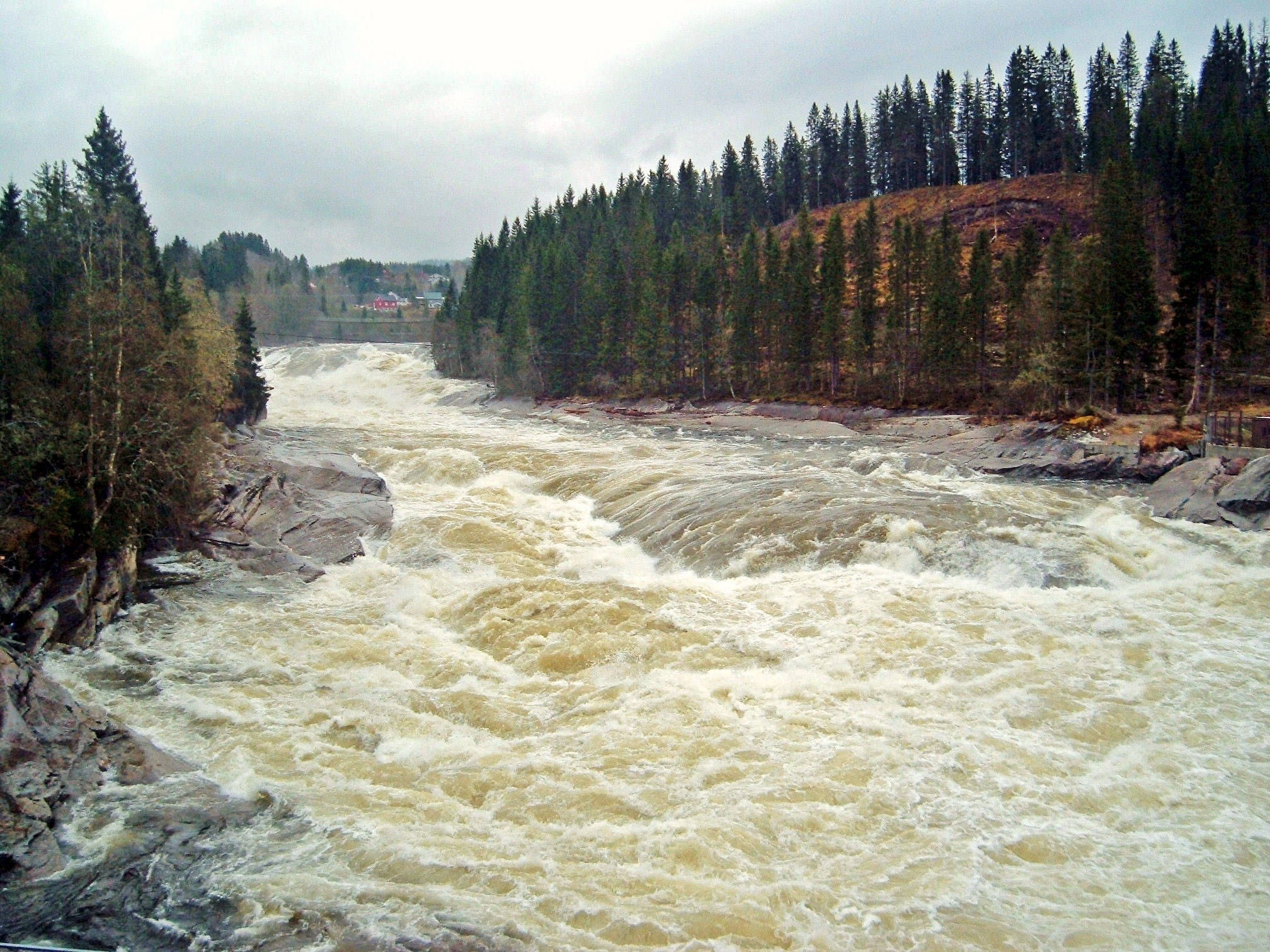 Tømmeråsfossen i Sanddøla. Foto: Karstein Osen